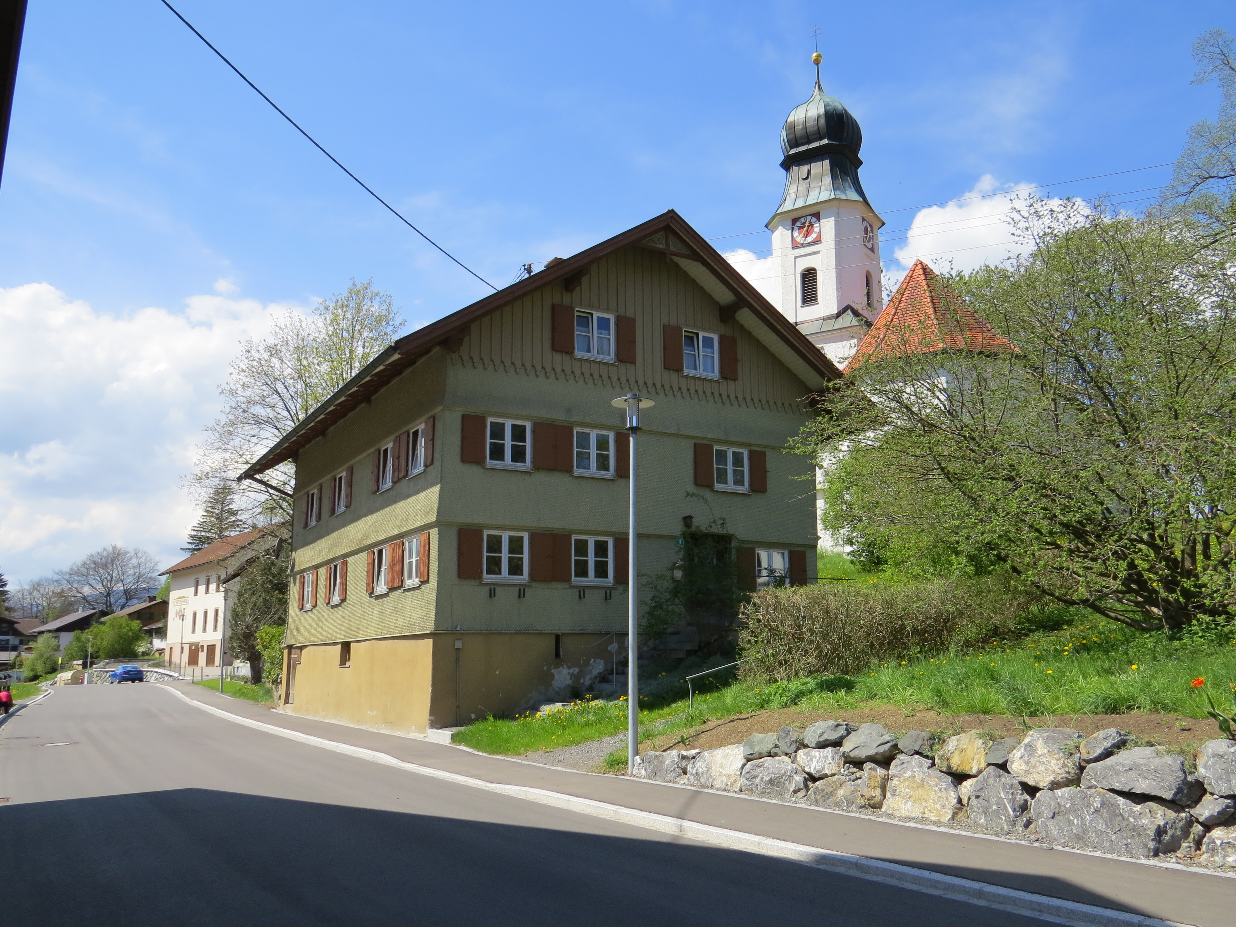 Pfarrhof in Rottach, Rettenberg